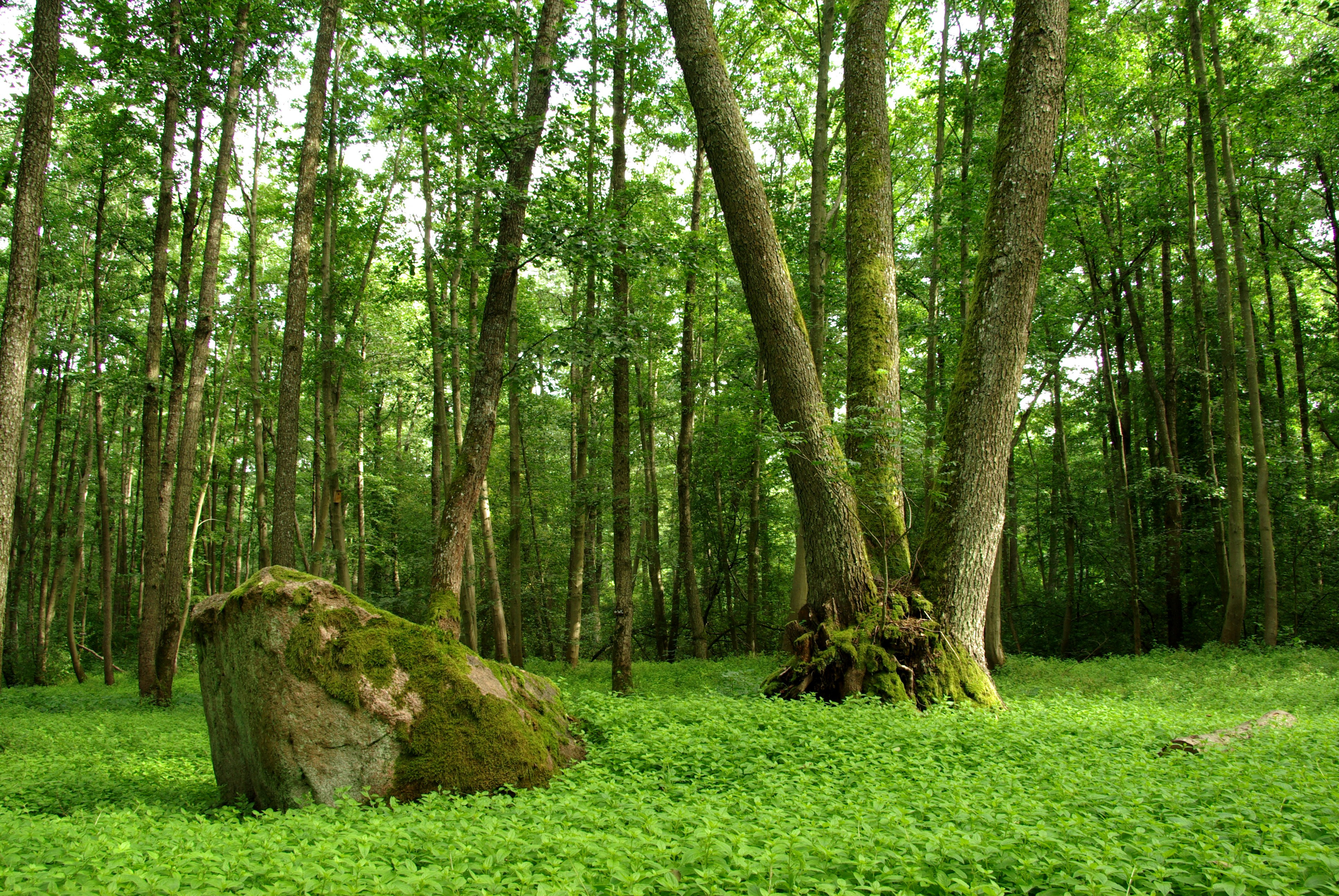 Maardu hiiemets on hiis Jõelähtme kihelkonna Saha ja Maardu külas